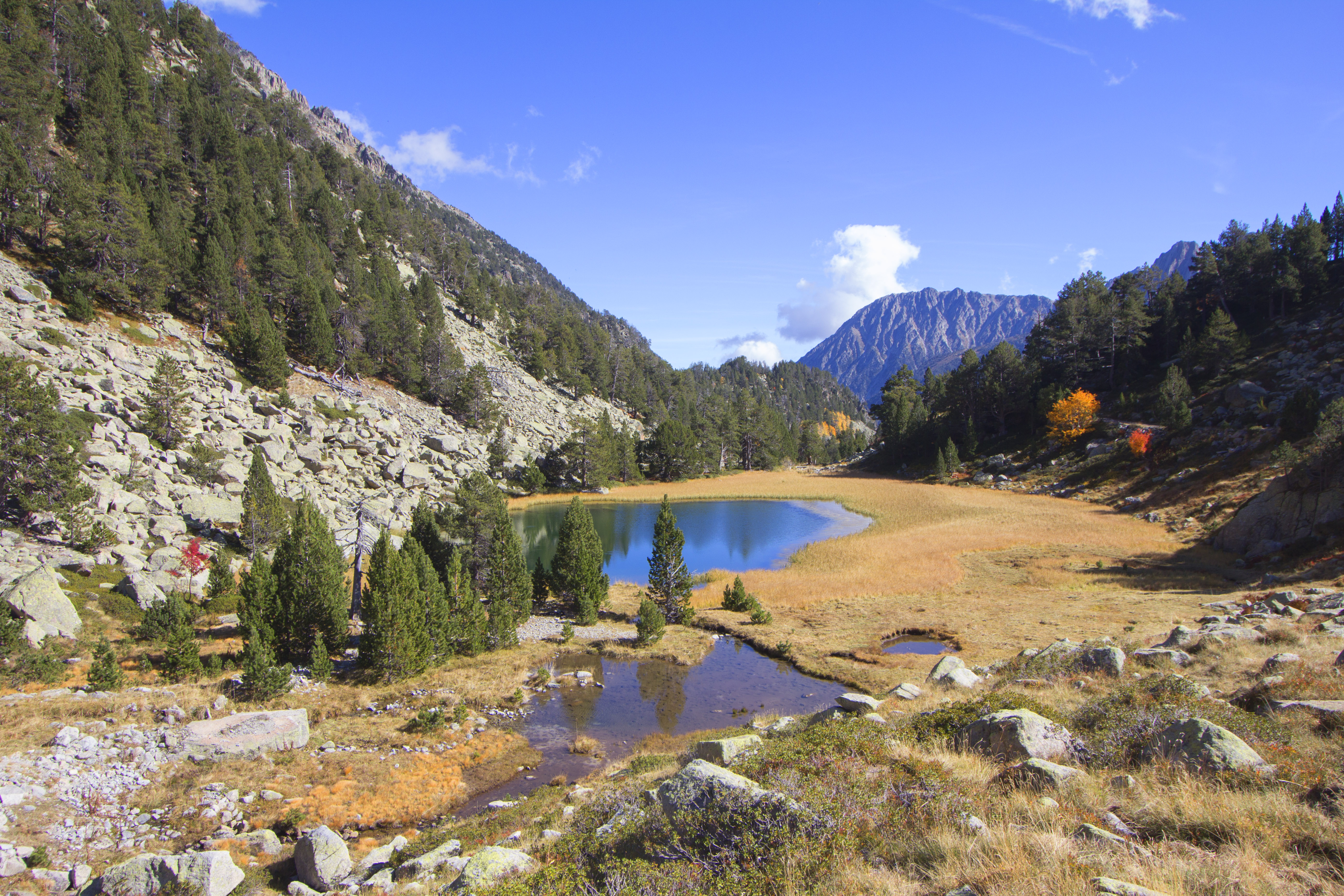 Estany de la Bassa (Pallars Sobirà)